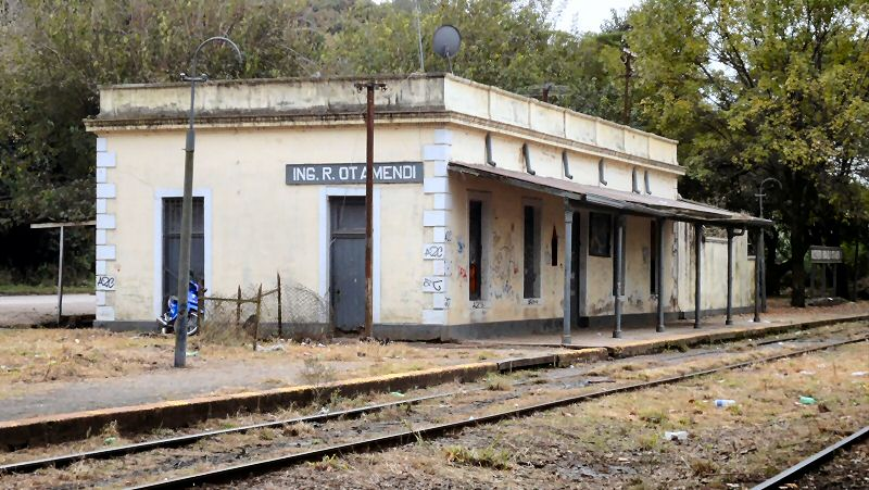 Estación Ingeniero Rómulo Otamendi, del ramal Villa Ballester - Zárate del FCGBM, concesionado a TBA.